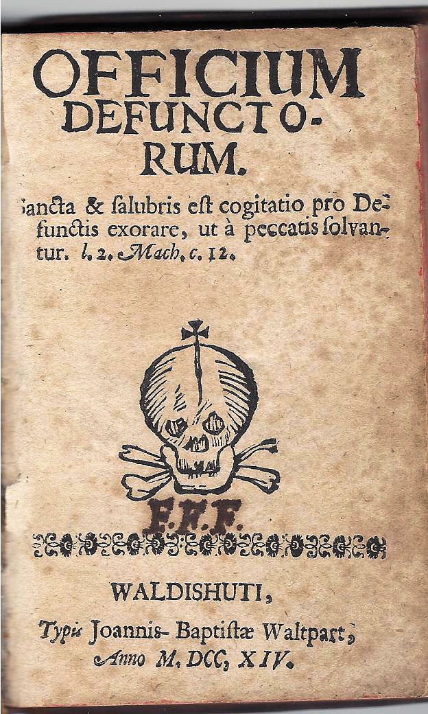 Titelblatt des 1714 durch Johann Baptist Waltpart in Waldshut gedruckten Officium Defunctorum aus eigenem Bestand.